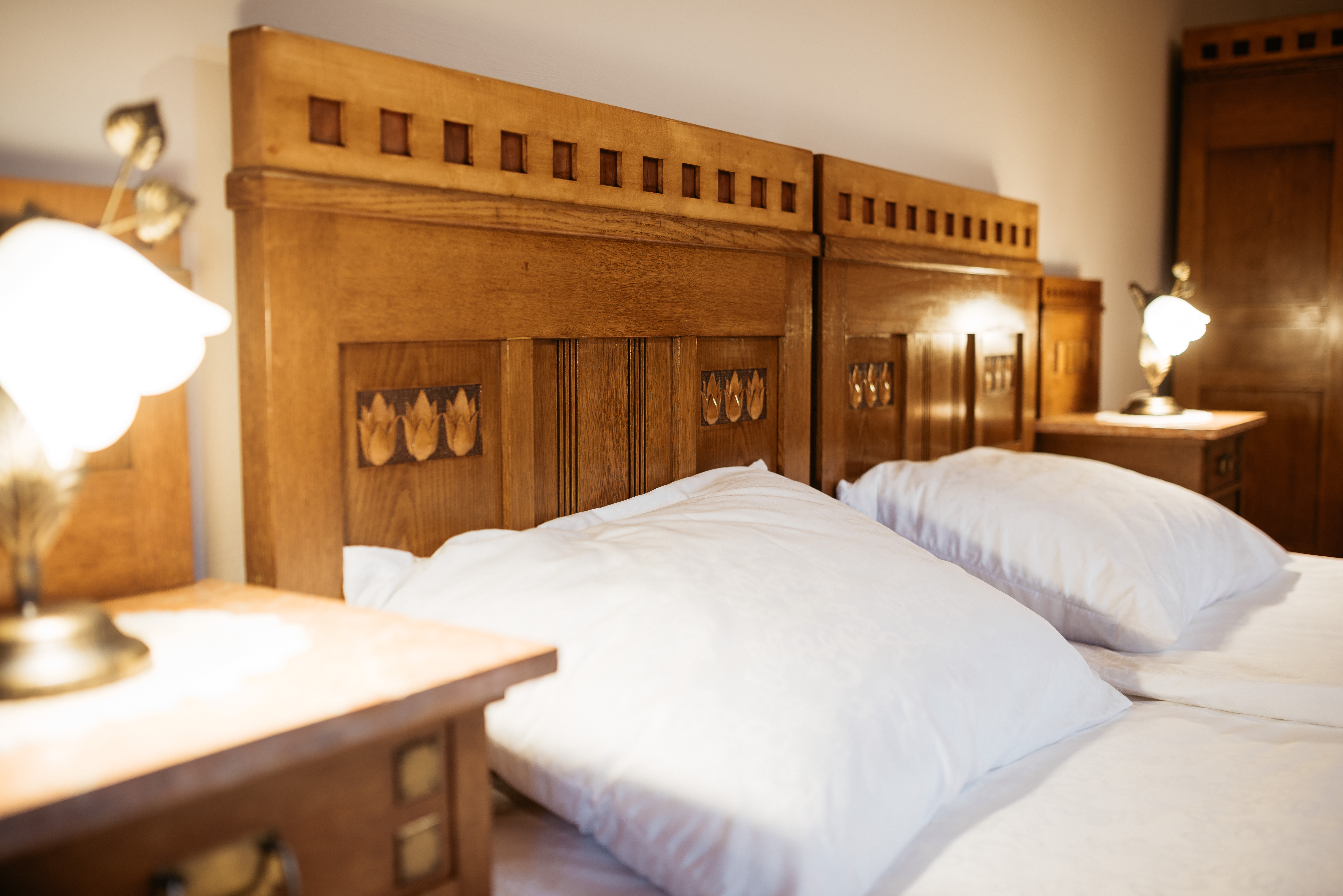 Soba Levo krilo v objektu Vogler - Sobodajalstvo Obal